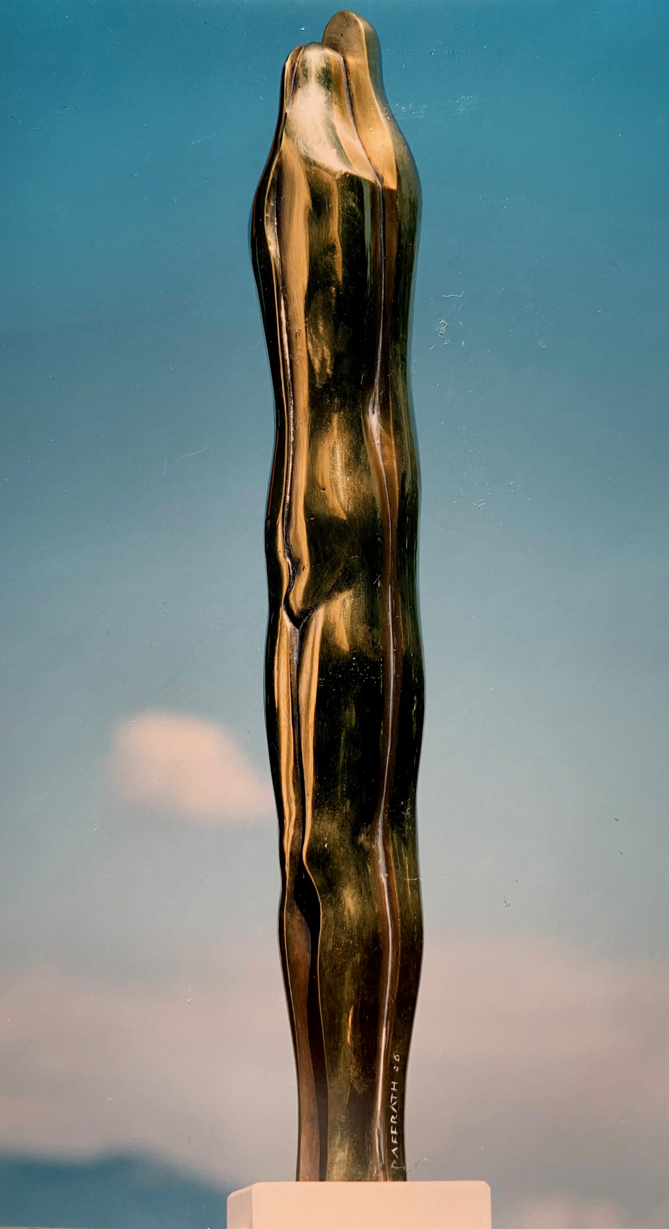 Die Liebenden - Messing, 53cm, 1986